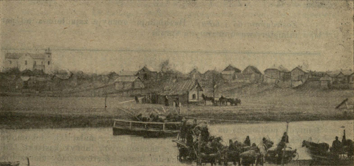 Беларуская (тарашкевіца): Чашнікі (Čašniki), перавоз цераз раку Улу (Uła). Касьцёл Сьвятога Лукі